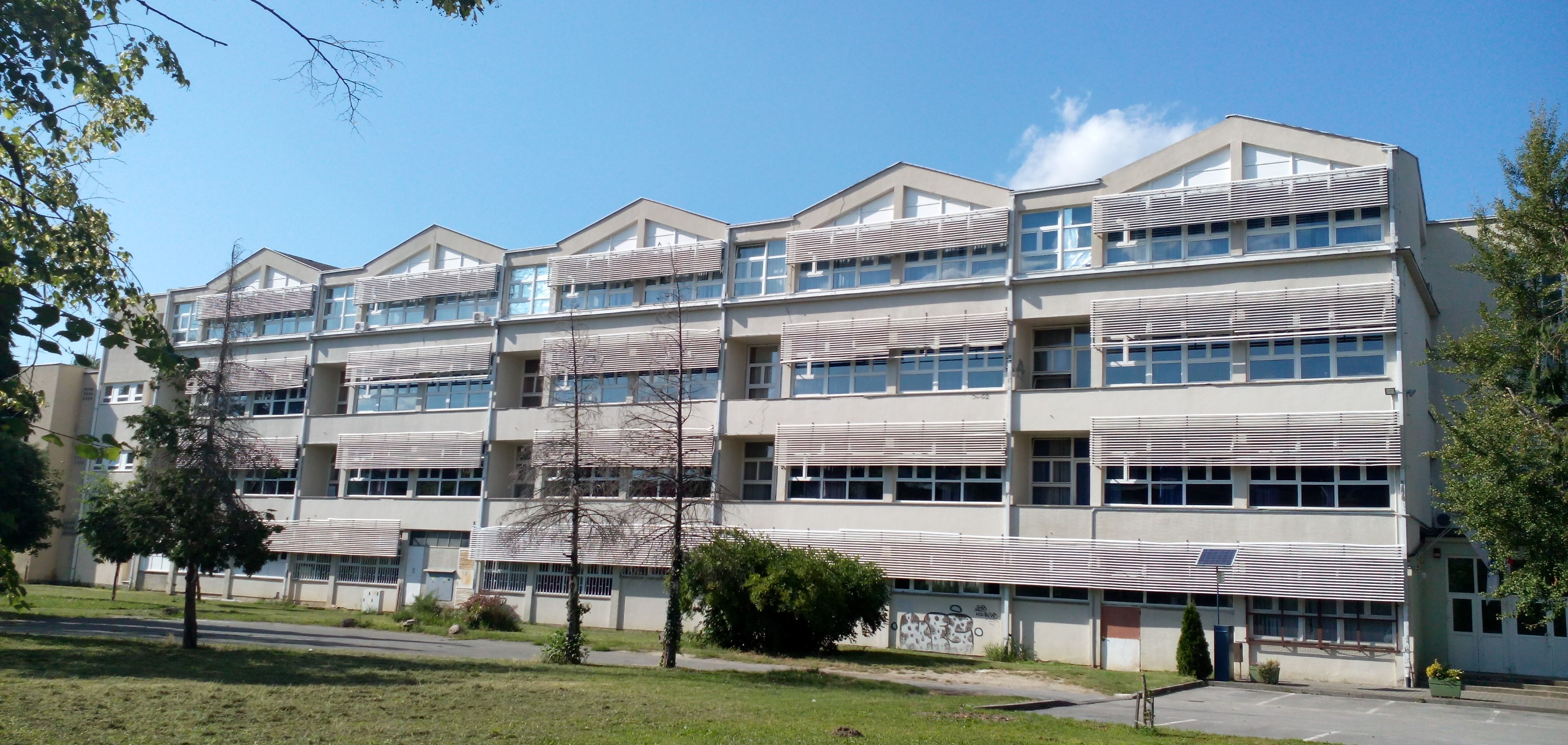 Fakultet elektrotehnike, računarstva i informacijskih tehnologija u Osijeku.